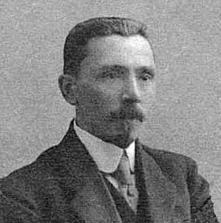 Ибниямин Абусугутович Ахтямов (иногда Абуссугудович; 6 ноября 1877, Уфа — 1941, СССР) — присяжный поверенный, депутат IV Государственной думы от Уфимской губернии (1912—1917).